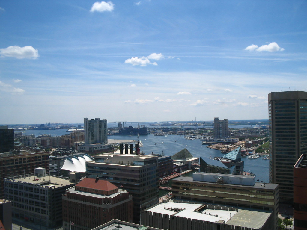 ബാൾട്ടിമോർ ഇന്നർഹാർബറിന്റെ ആകാശ വീക്ഷണം